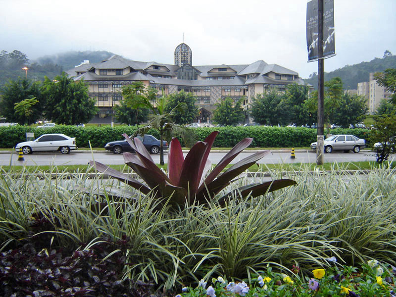 Fórum de Joinville (Joinville House Judiciary), Joinville, Brazil.